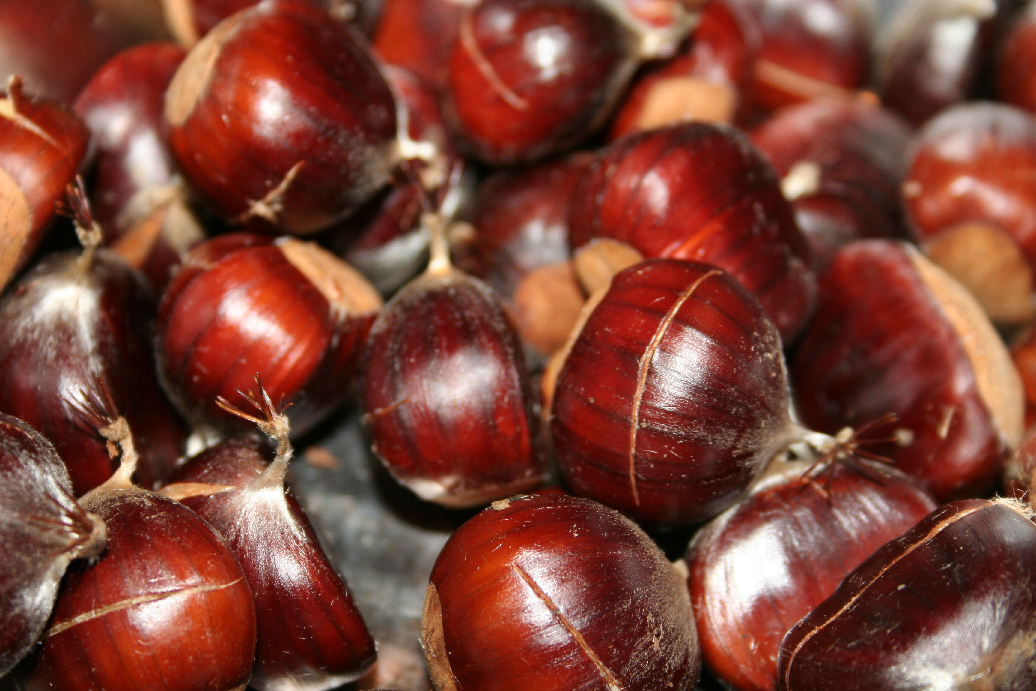 Chestnuts, fall 2006 / Edelkastanien im Herbst 2006